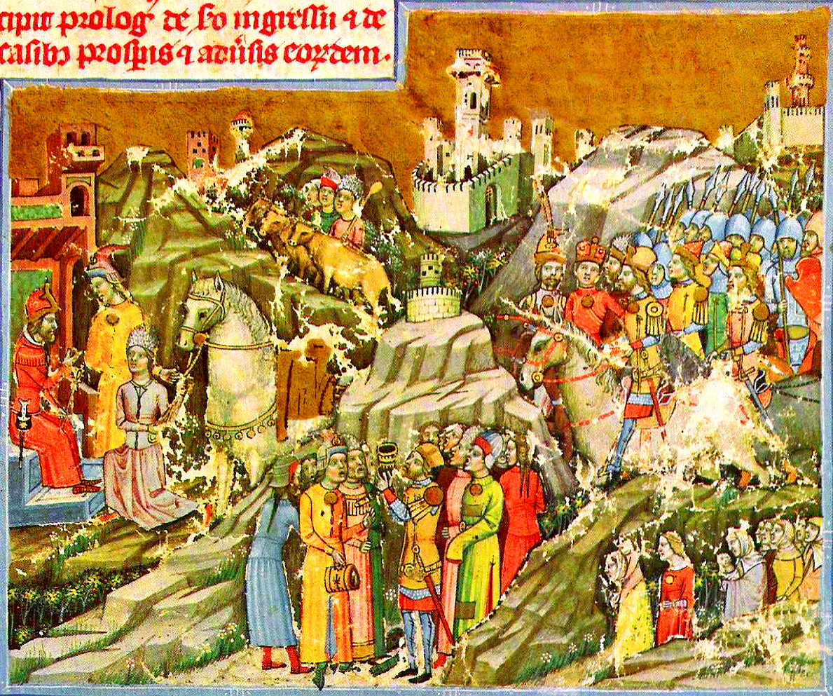 A magyarok bejövetele Pannóniába (Honfoglalás). Miniatúra a Képes Krónikában